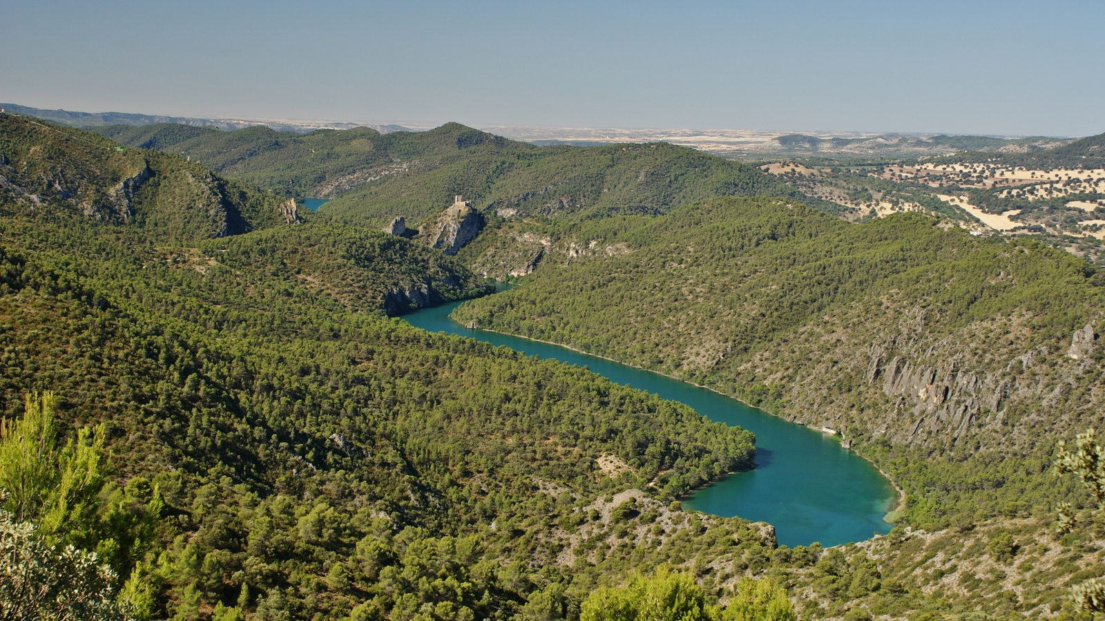 Castillo de Aguix, castillo medieval erigido en 1160 por Martín Ordoño. Se encuentra sobre una peña asomado al río Tajo en Aguix, Sayatón, Guadalajara